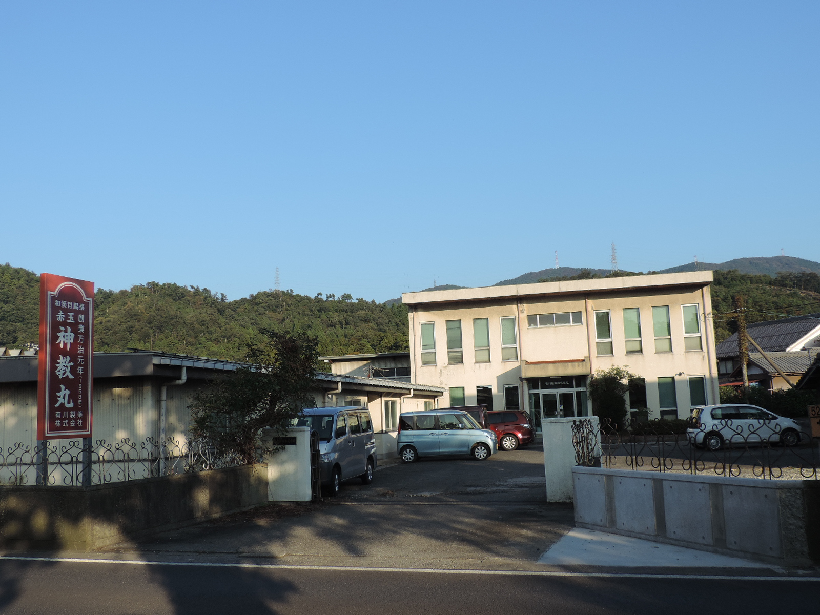 有川製薬株式会社本社（滋賀県彦根市）。2017年撮影